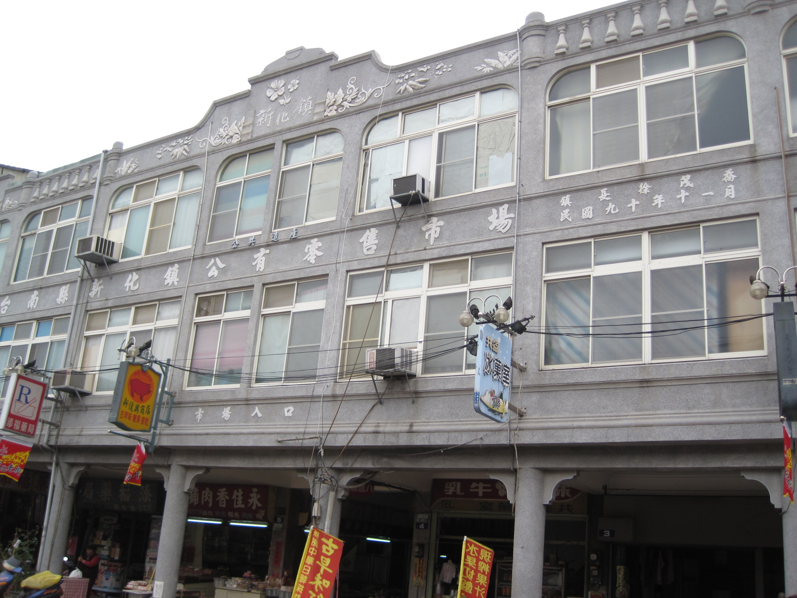 新化公有零售市場Bân-lâm-gú: Tâi-lâm Sin-huà ê kong-iú tshī-tiûnn. 臺南新化的公有市場